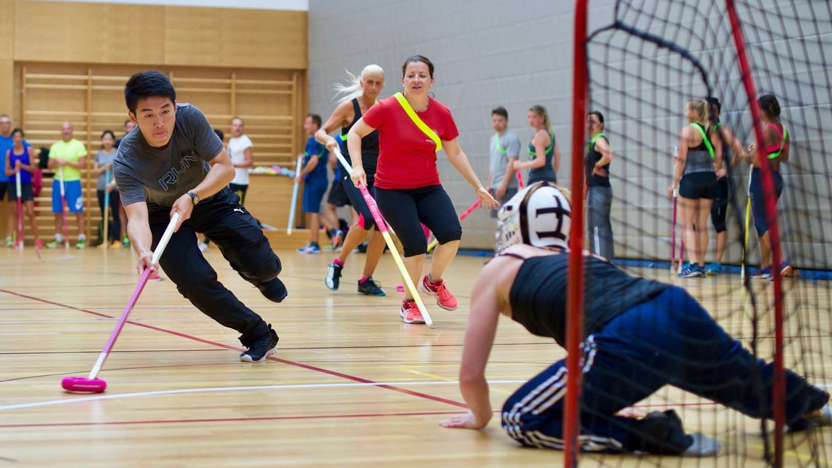 Donut Hockey-Turnierszene Taiwan vs. Schweiz mit Torschuss